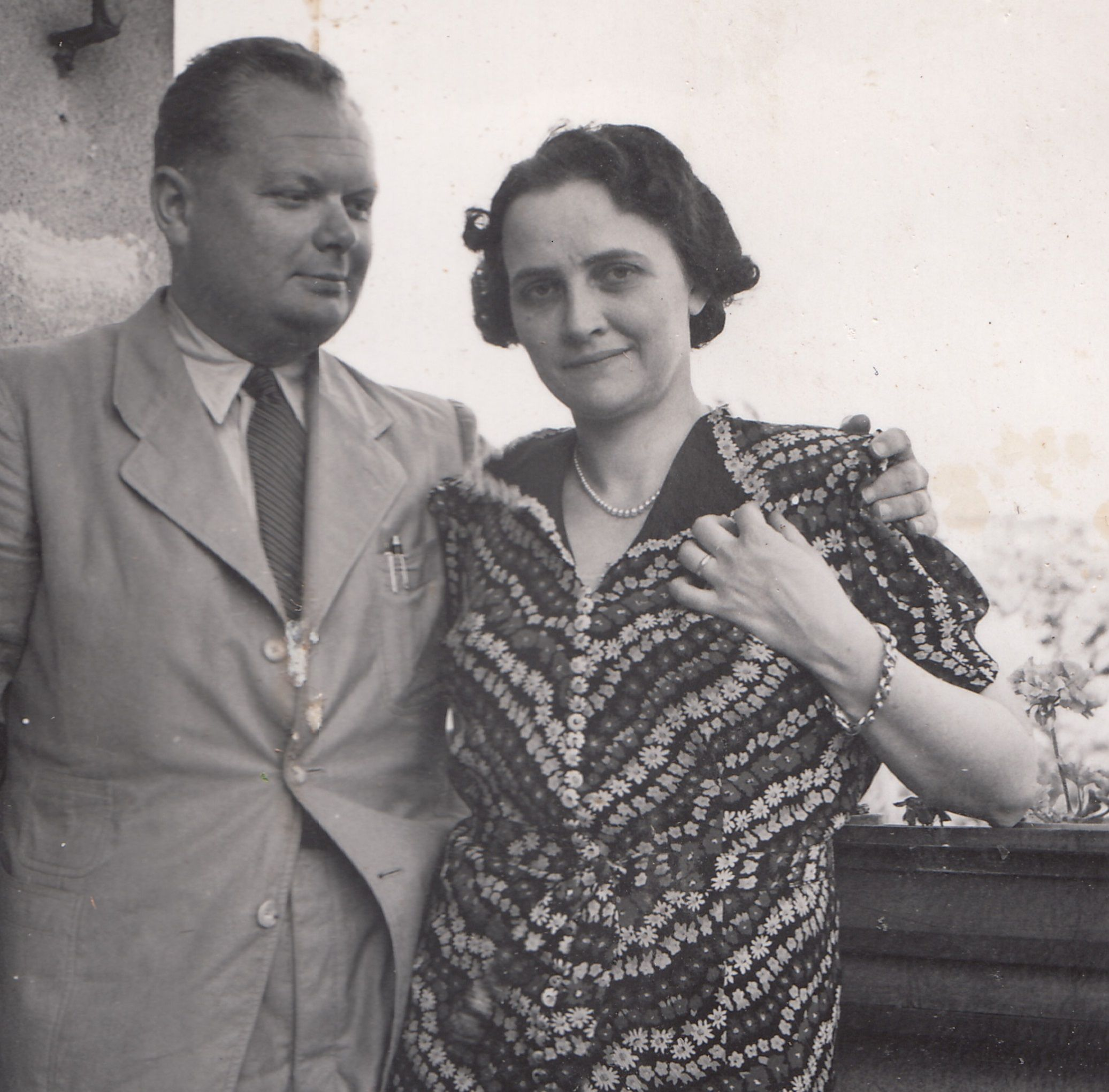 Rimanóczy Gyula a feleségével 1942-ben a Küküllő utcában